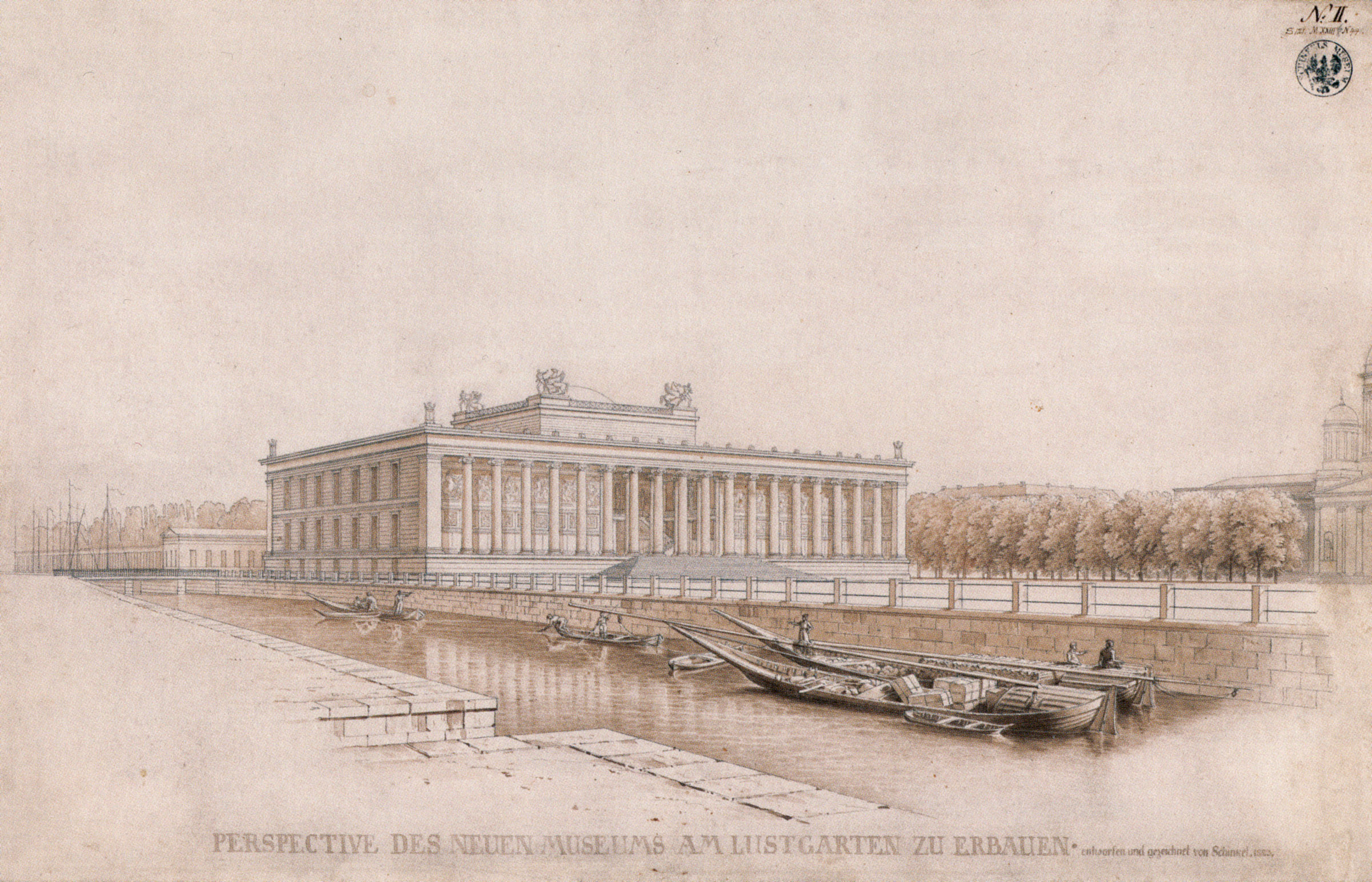 Altes Museum Berlin, Schaubild von Schinkel 1825